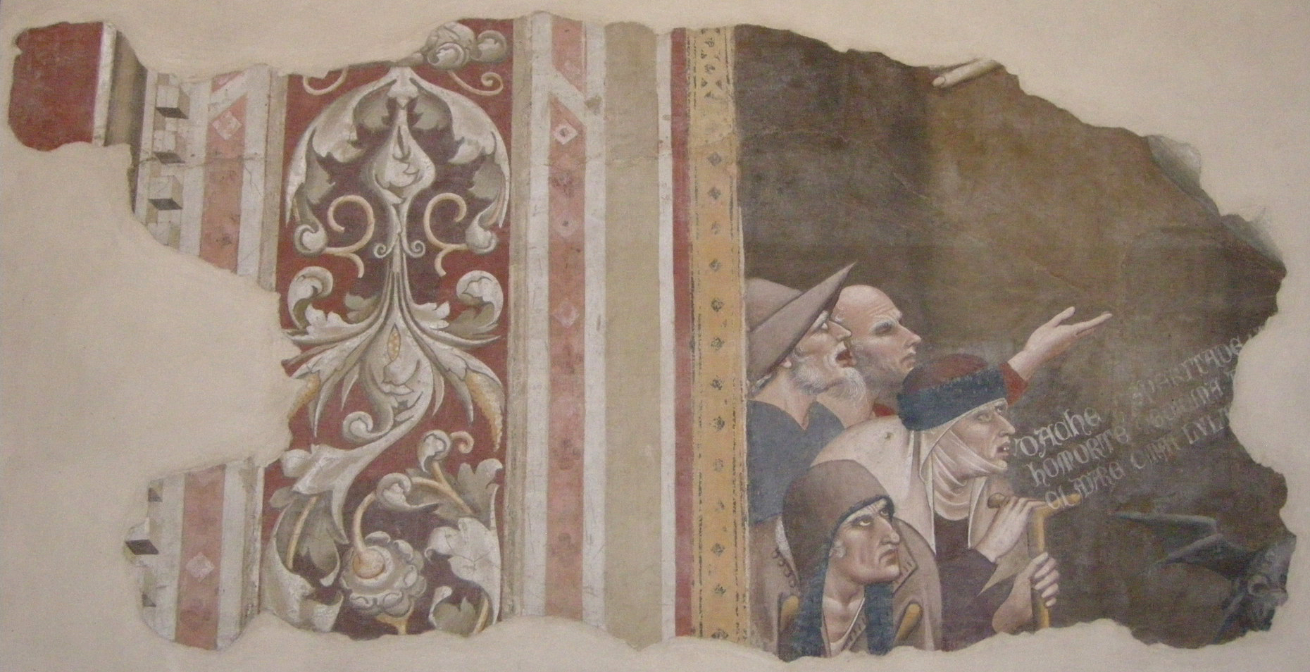 Refettorio santa croce, frammento di andrea orcagna